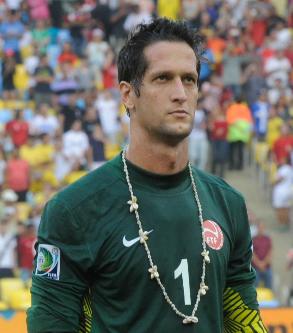 Mickaël Roche